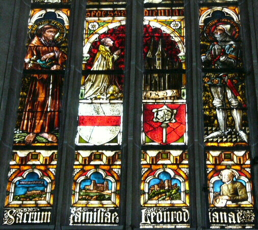 Glasmalerei im Eichstätter Dom mit Hinweis auf die darunter befindliche Grablege der Leonrod